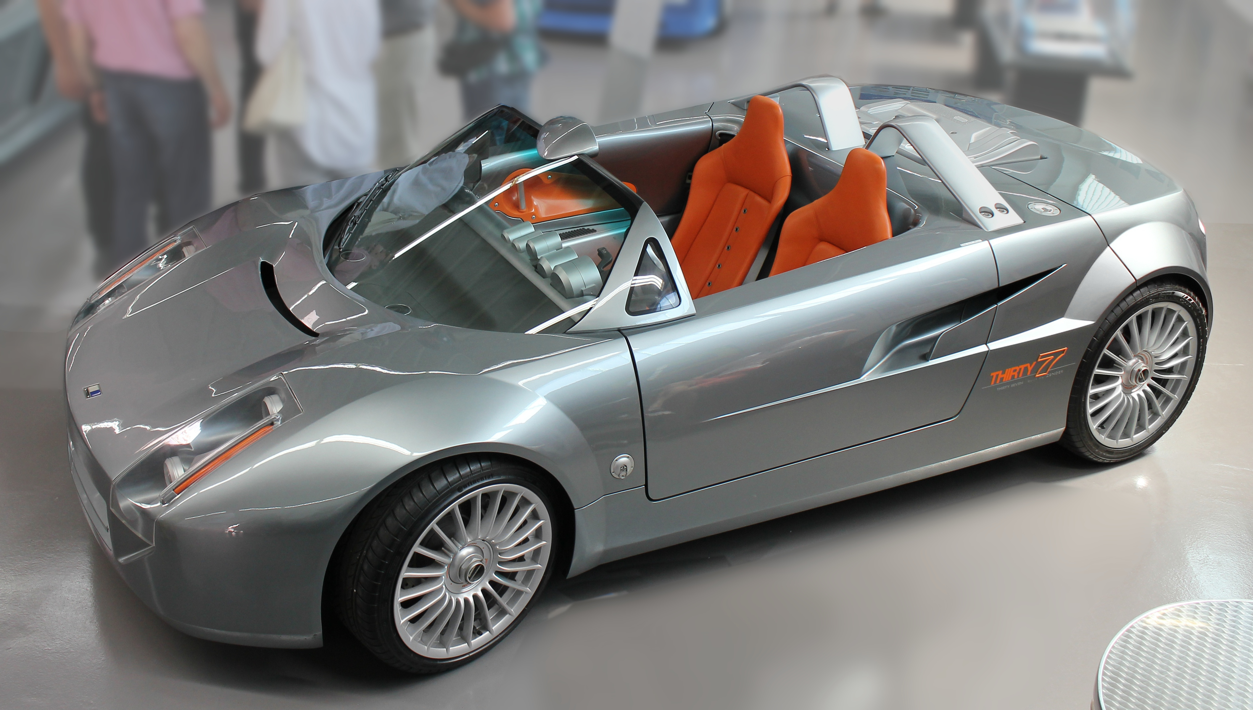 Zender Thirty 7, Baujahr 1999; VW-4-Zylinder-Reihenmotor quer in Fahrzeugmitte, 1,8 Liter Hubraum, 230 PS, Konstruiert von Zender-Mitarbeitern in Mülheim-Kärlich. Der Wagen wurde auf der IAA 1999 in Frankfurt erstmals vorgestellt. Er blieb ein Einzelstück.